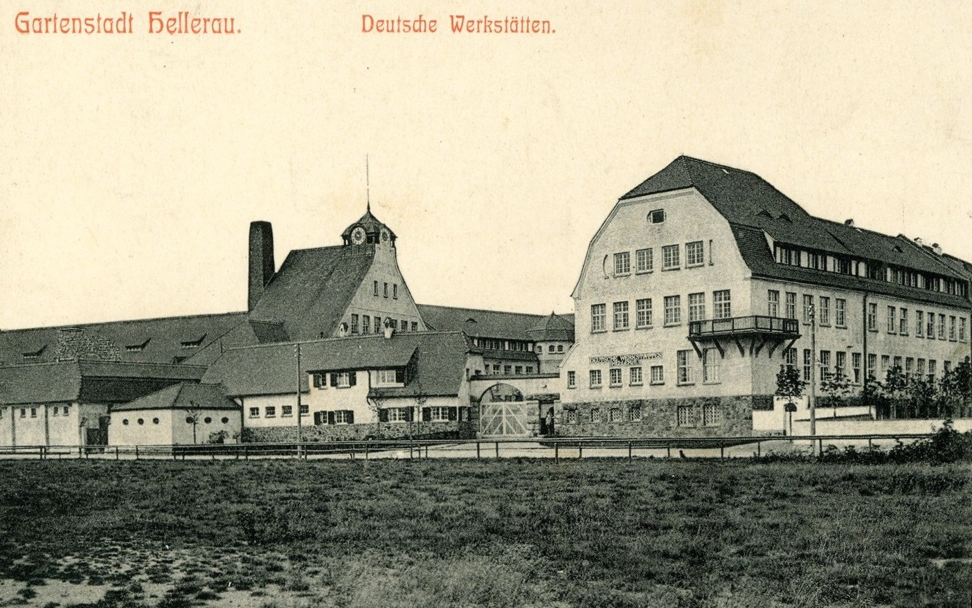 Hellerau; Deutsche Werkstätten This postcard is from publisher Brück & Sohn in Meißen ( This postcard has a unique number 12408 and is available in a higher resolution at the publisher. This images was uploaded in a cooperation project between Wikipedians and the publisher.